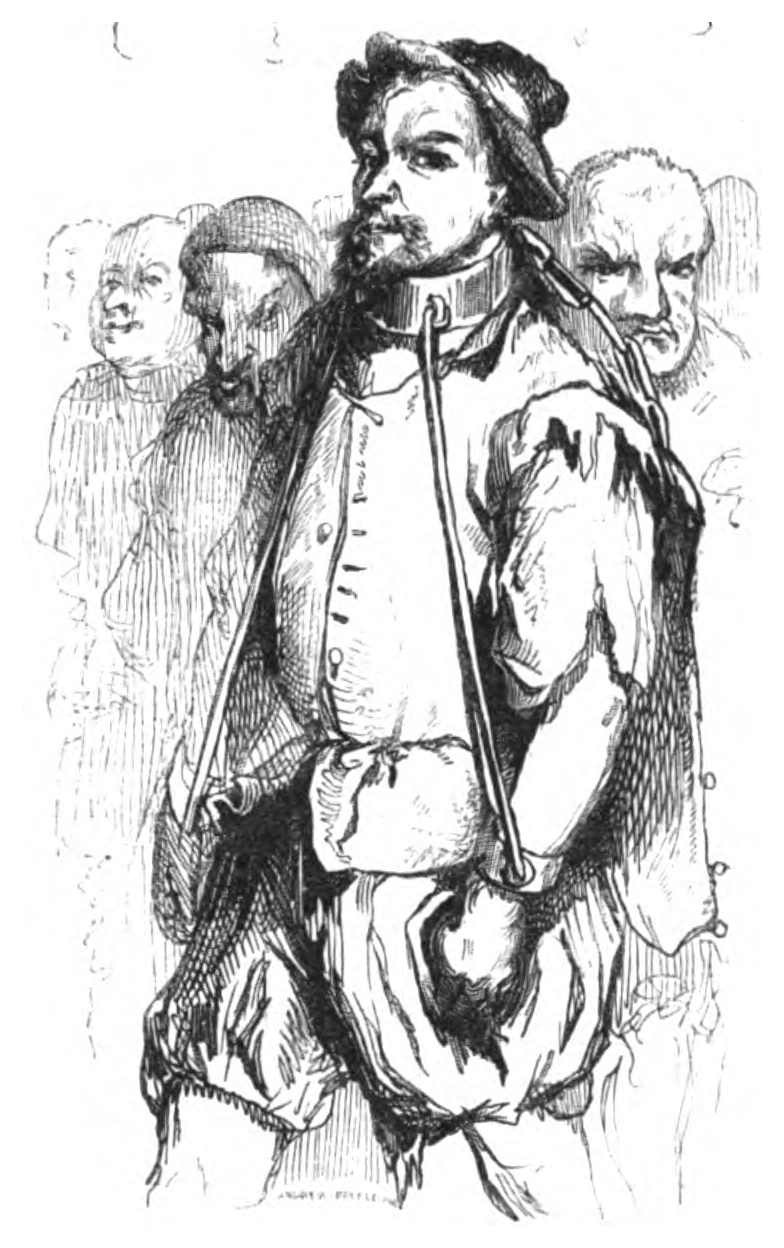 Illustration of « L’Ingénieux Hidalgo Don Quichotte de la Manche, traduction Viardot, 1836, tome 1 »